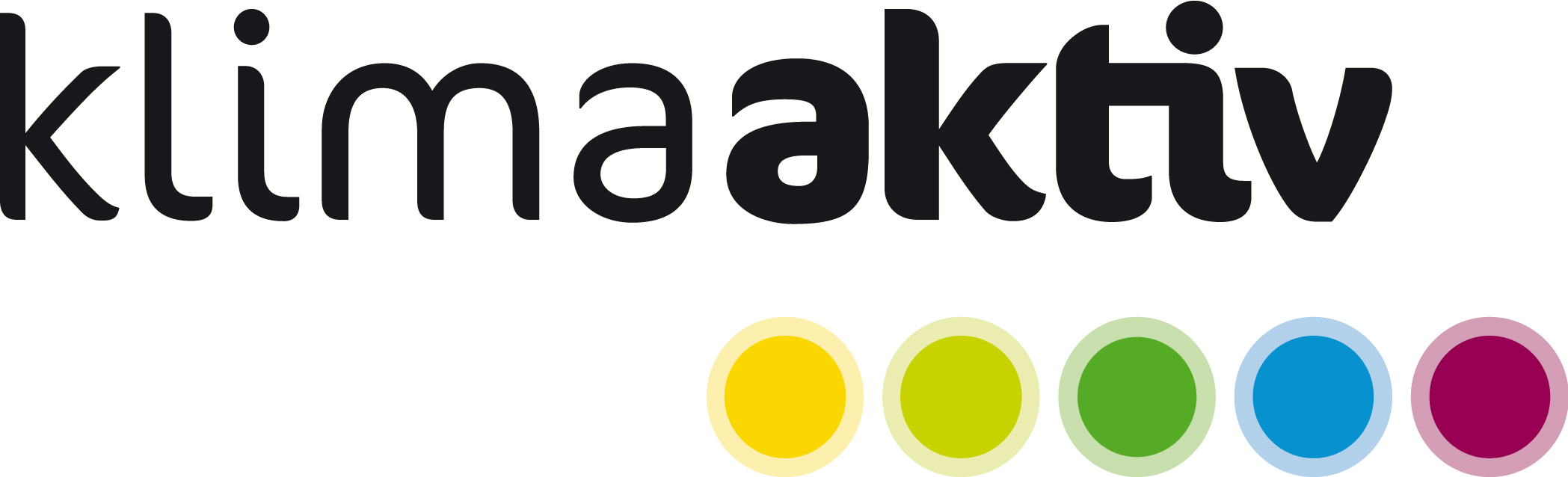 Logo-Relaunch 2014: Schrift und Farben wurden leicht geändert gegenüber dem alten Logo